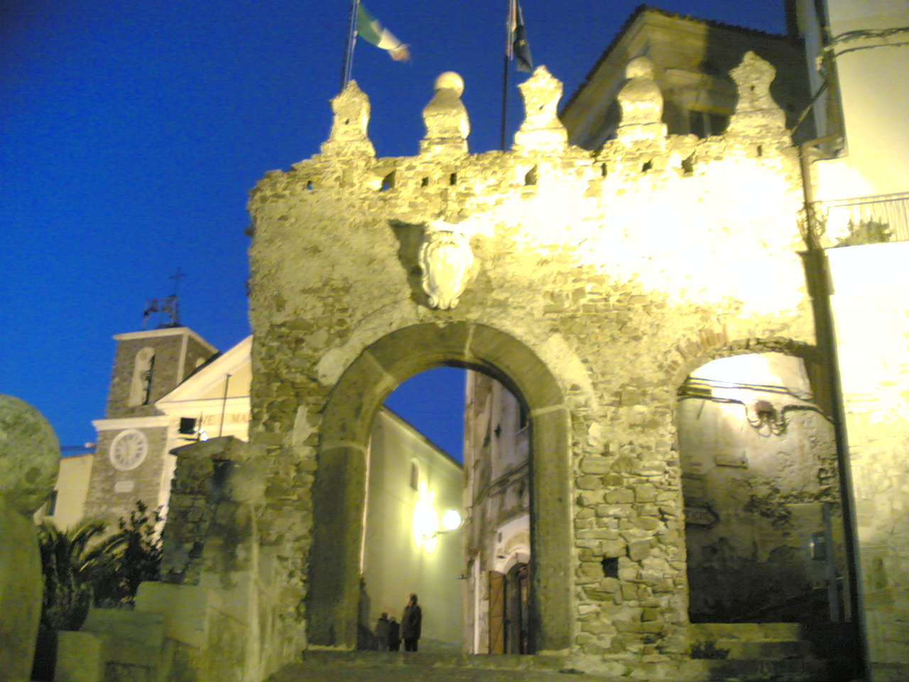 Carlo Iannuzzi, Opera Propria, Agropoli - La Porta, GFDL e Creative Commons CC-BY-SA tutte le versioni (3.0, 2.5, 2.0 e 1.0), sono l'autore